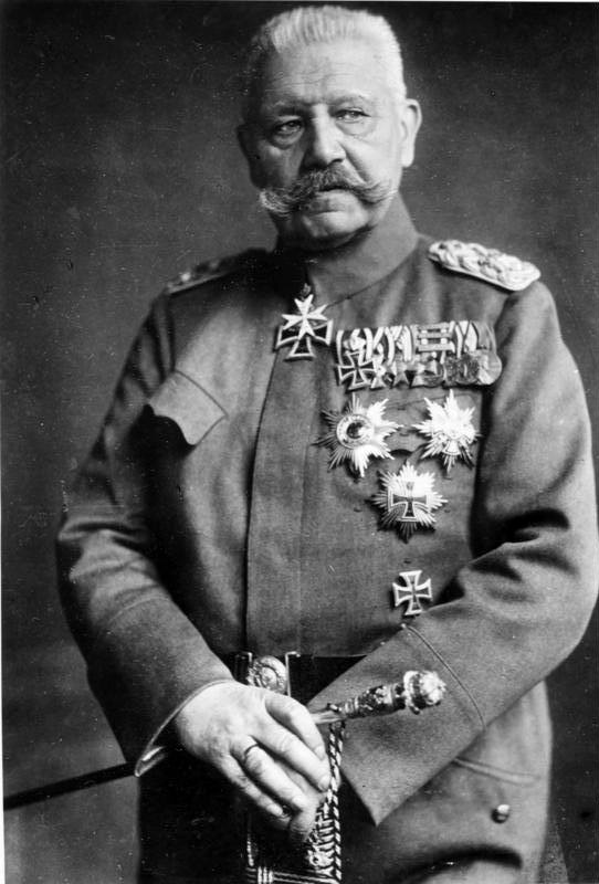 ADN-ZB Generalfeldmarschall Paul von Beneckendorf und Hindenbug geboren: 2.10.1847 in Posen, gestorben: 2.8.1934 in Neudeck (Ostpreußen) deutscher Heerführer im I. Weltkrieg und Reichspräsident der Weimarer Republik seit 1925